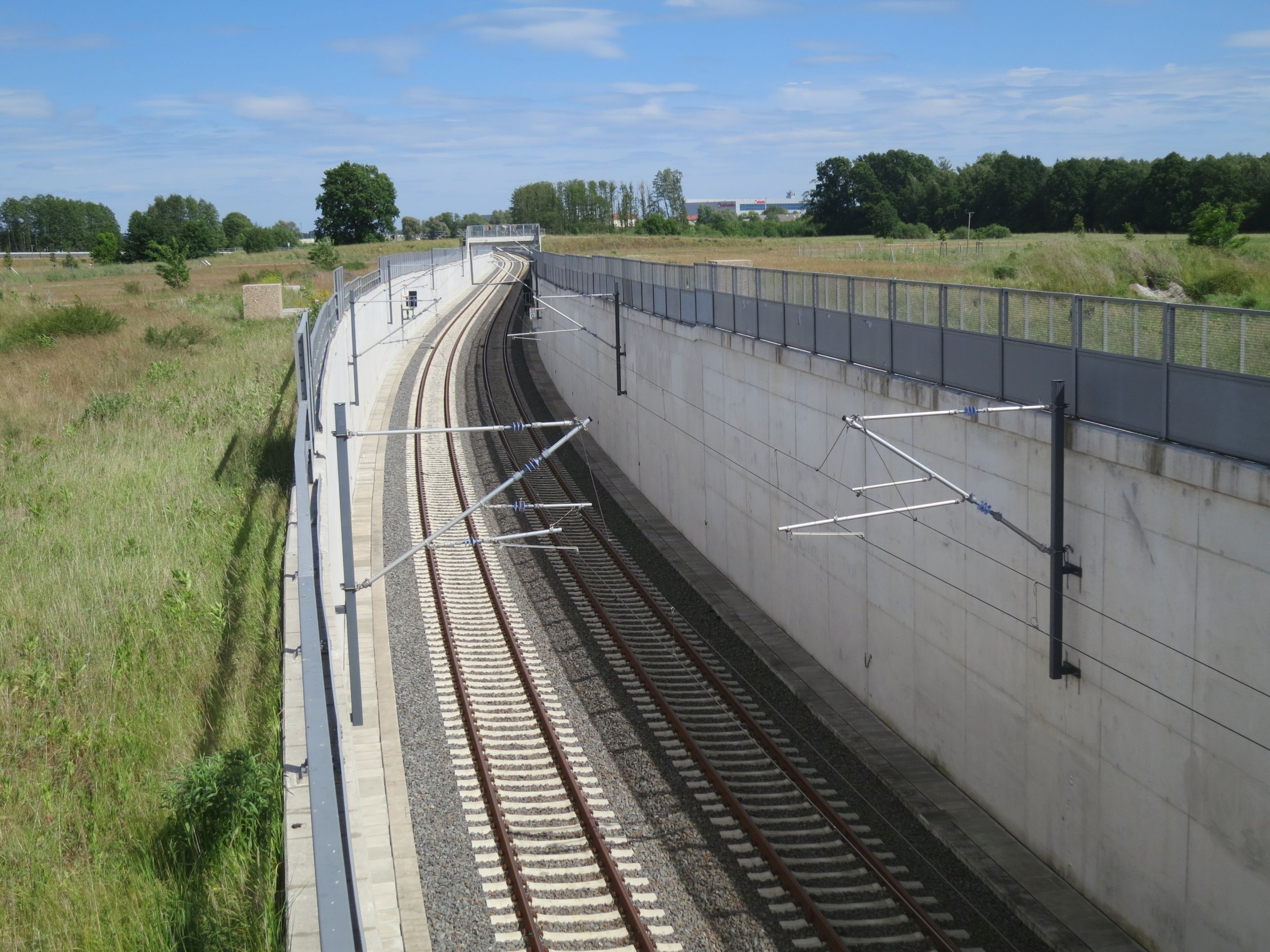 Fernbahnstrecke zum Flughafen BER, Trog hinter der Unterquerung des Außenrings